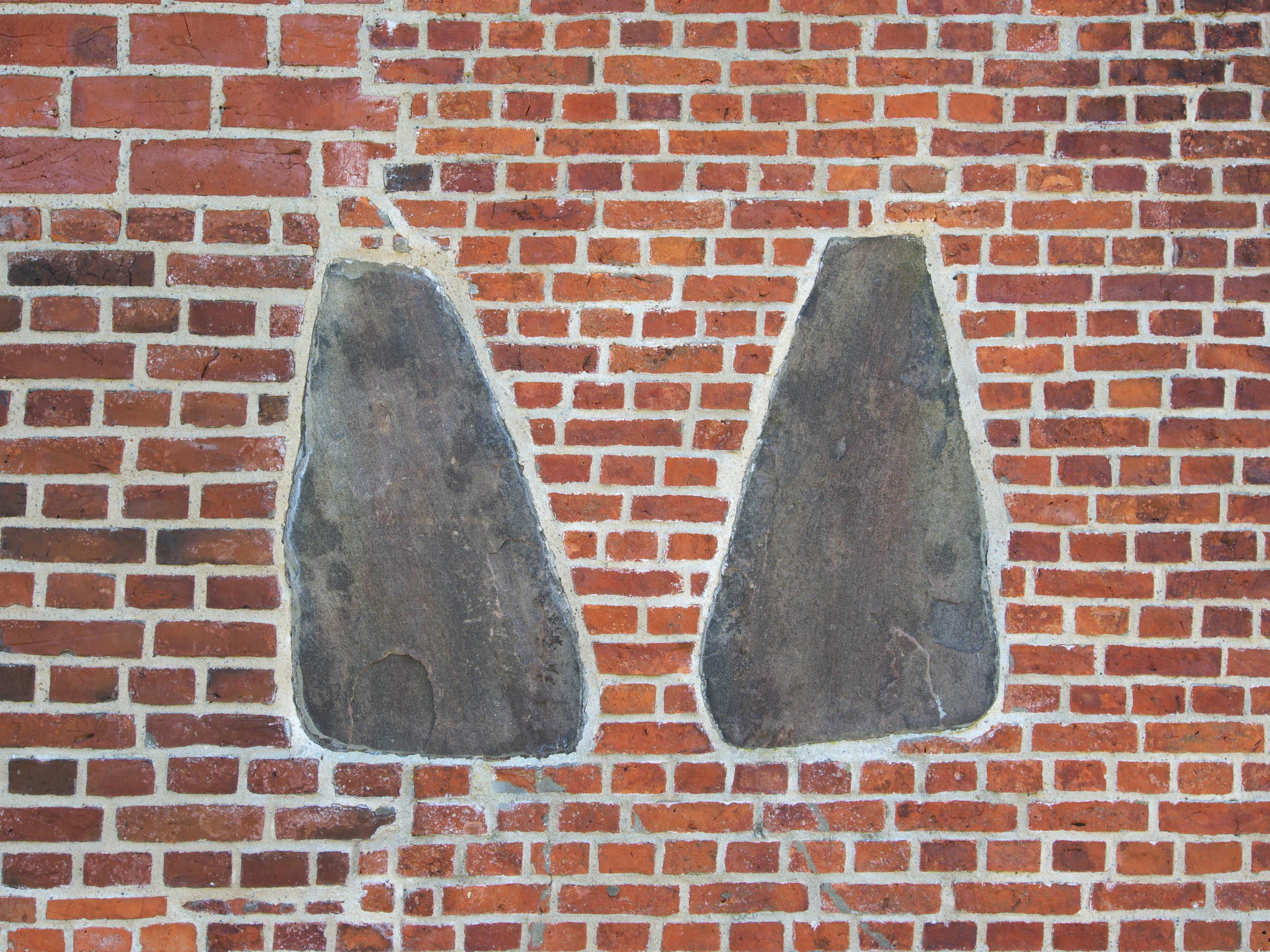 Kirche St. Severin in Keitum auf Sylt. Einer alten Sage zufolge handelt es sich bei diesen zwei in die Westwand des Kirchturms eingebauten Feldsteinen um die Grabsteine der Schwestern Ing und Dung, die den Bau des Turms finanziert haben sollen.